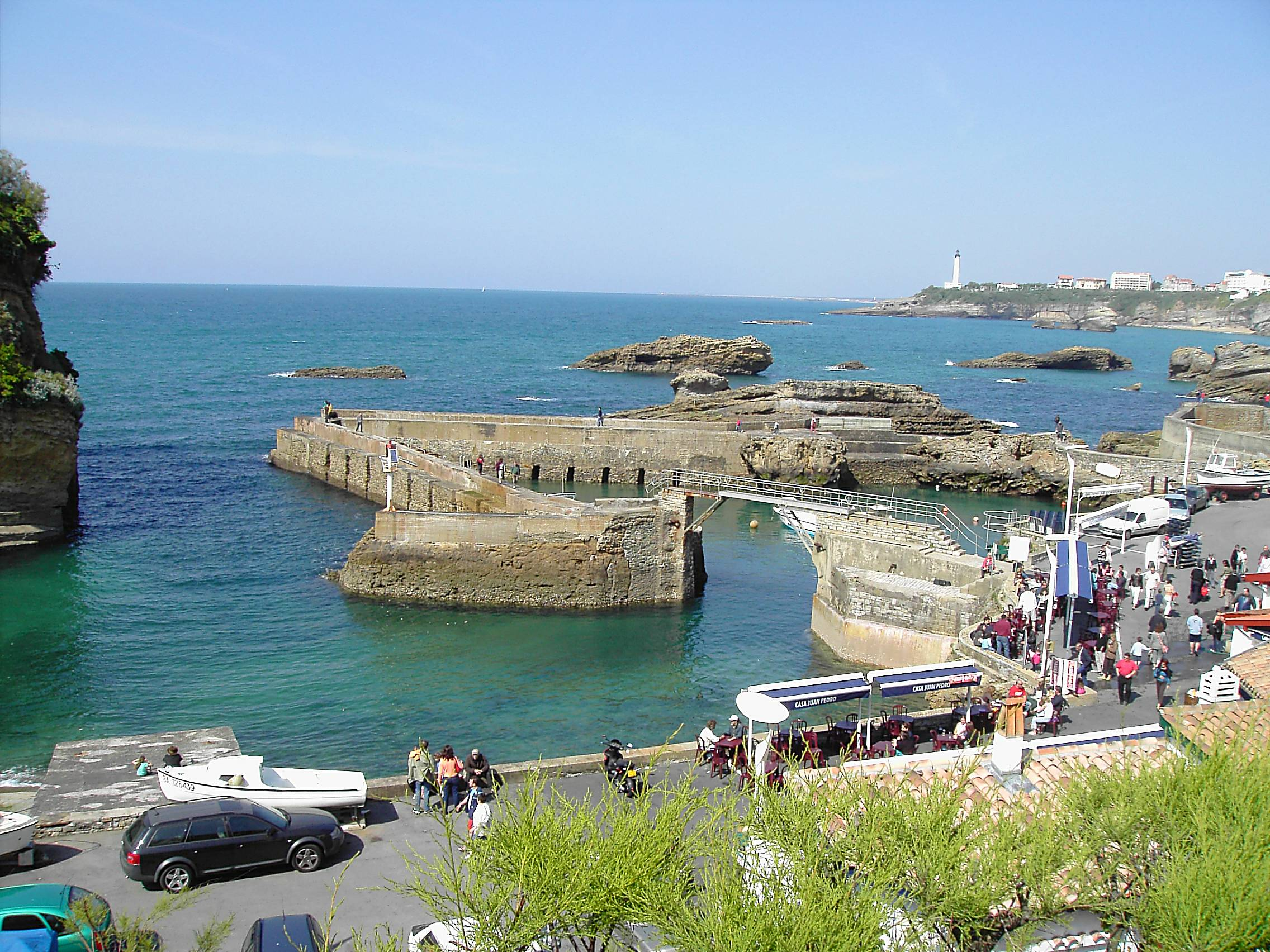 Biarritz, le port des pêcheurs. Photo prise le 04/05/06 par Harrieta171